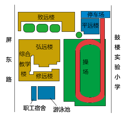 福州屏东中学地图（带文字）